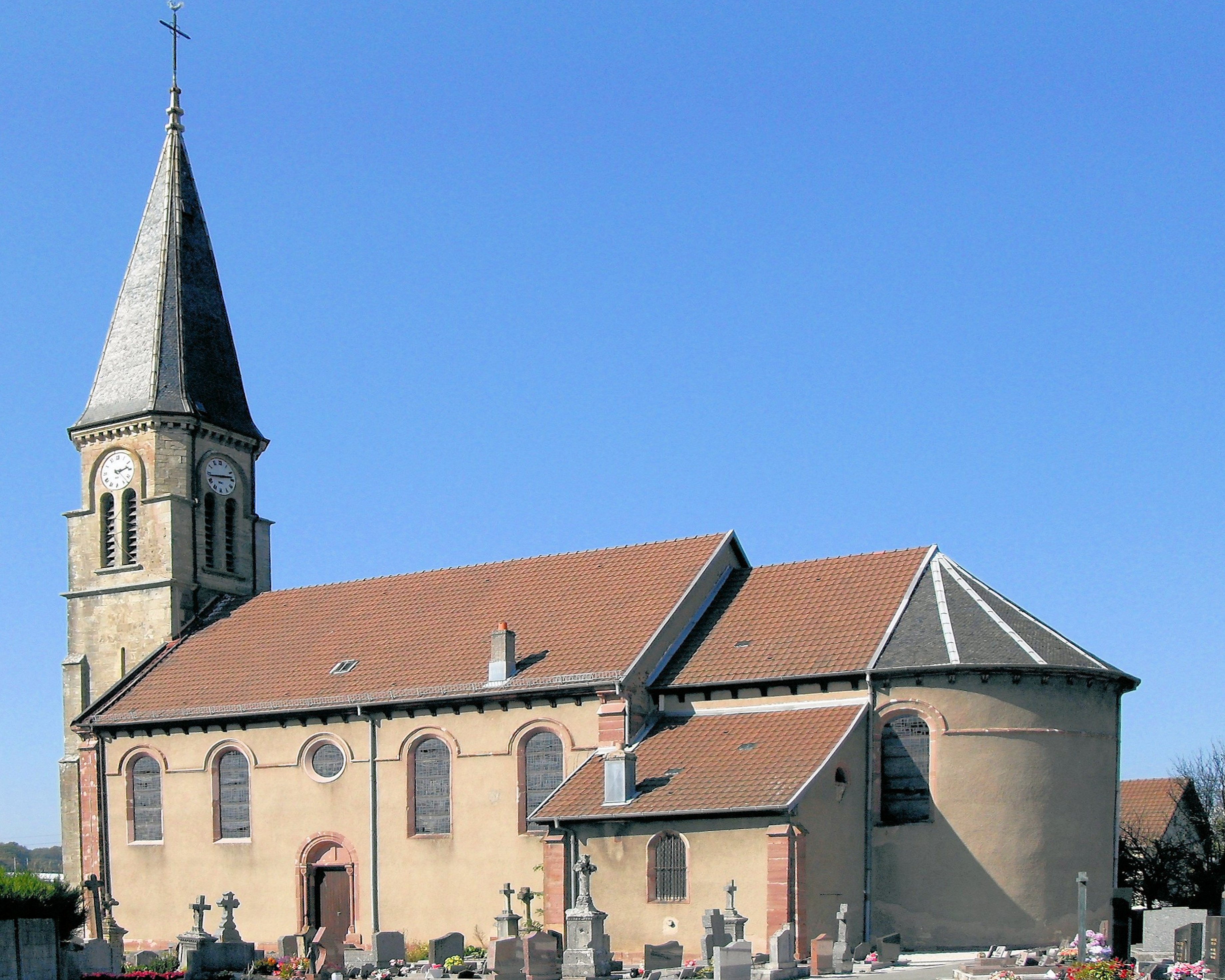 L'église Sainte-Marguerite à Trévenans